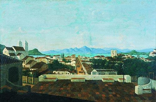 Vue de la ville de Desterro, aujourd'hui Florianópolis, Santa Catarina, Brésil